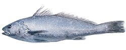 ombrina (Argyrosomus regius)